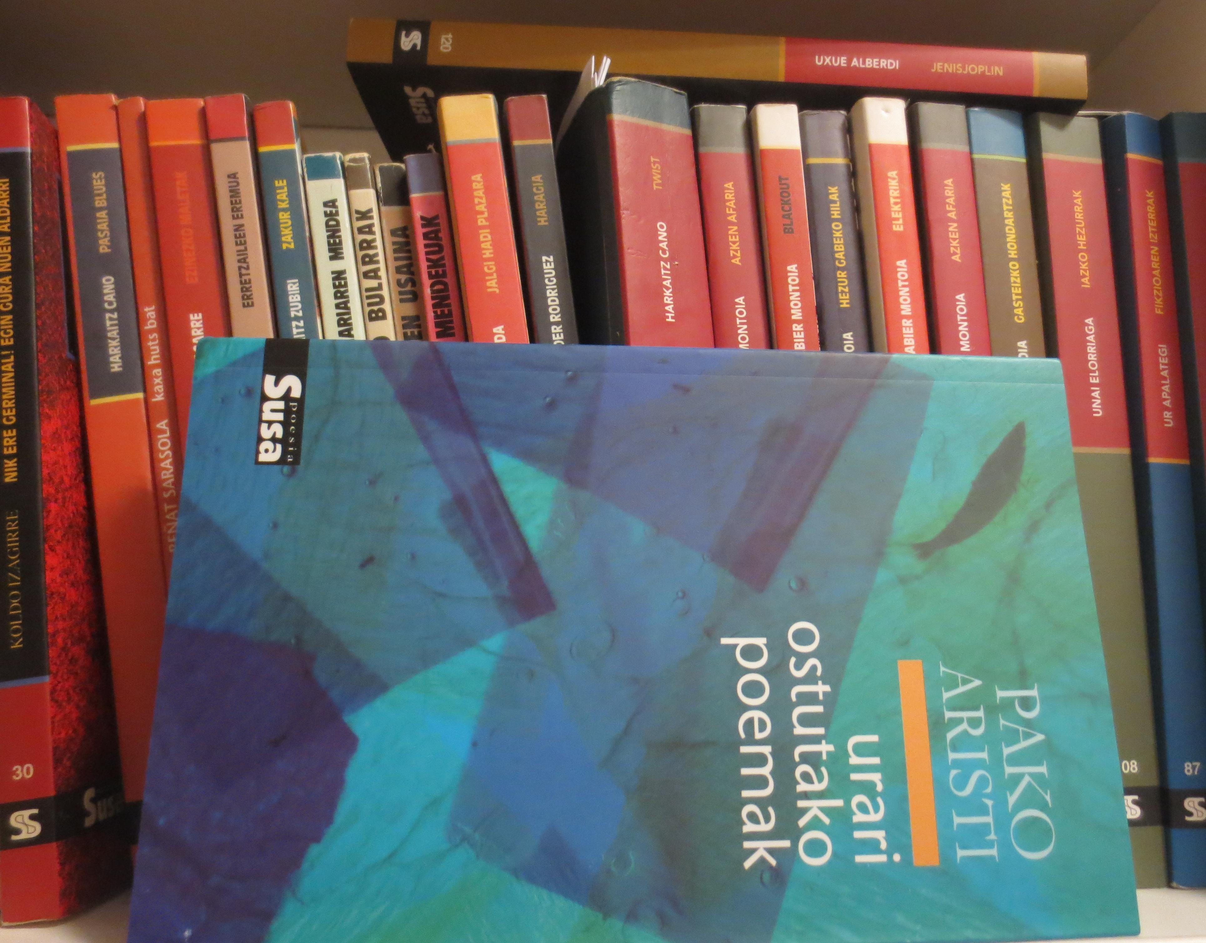 Pako Aristik 2014an Susa argitaletxeren eskutik argitaraturiko liburua. Atzean, argitaletxe bereko beste liburu batzuk.